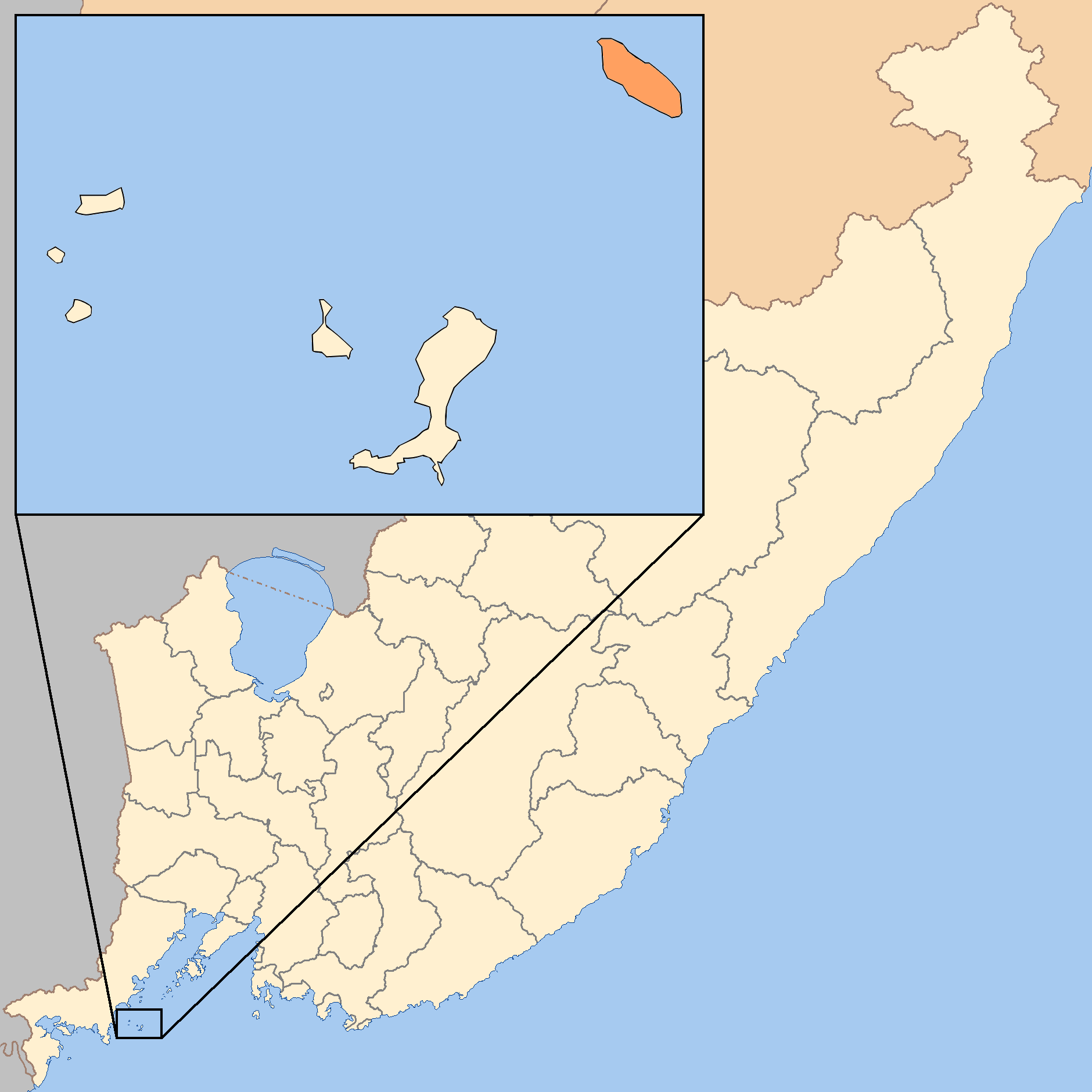 Остров Стенина на карте Приморского края